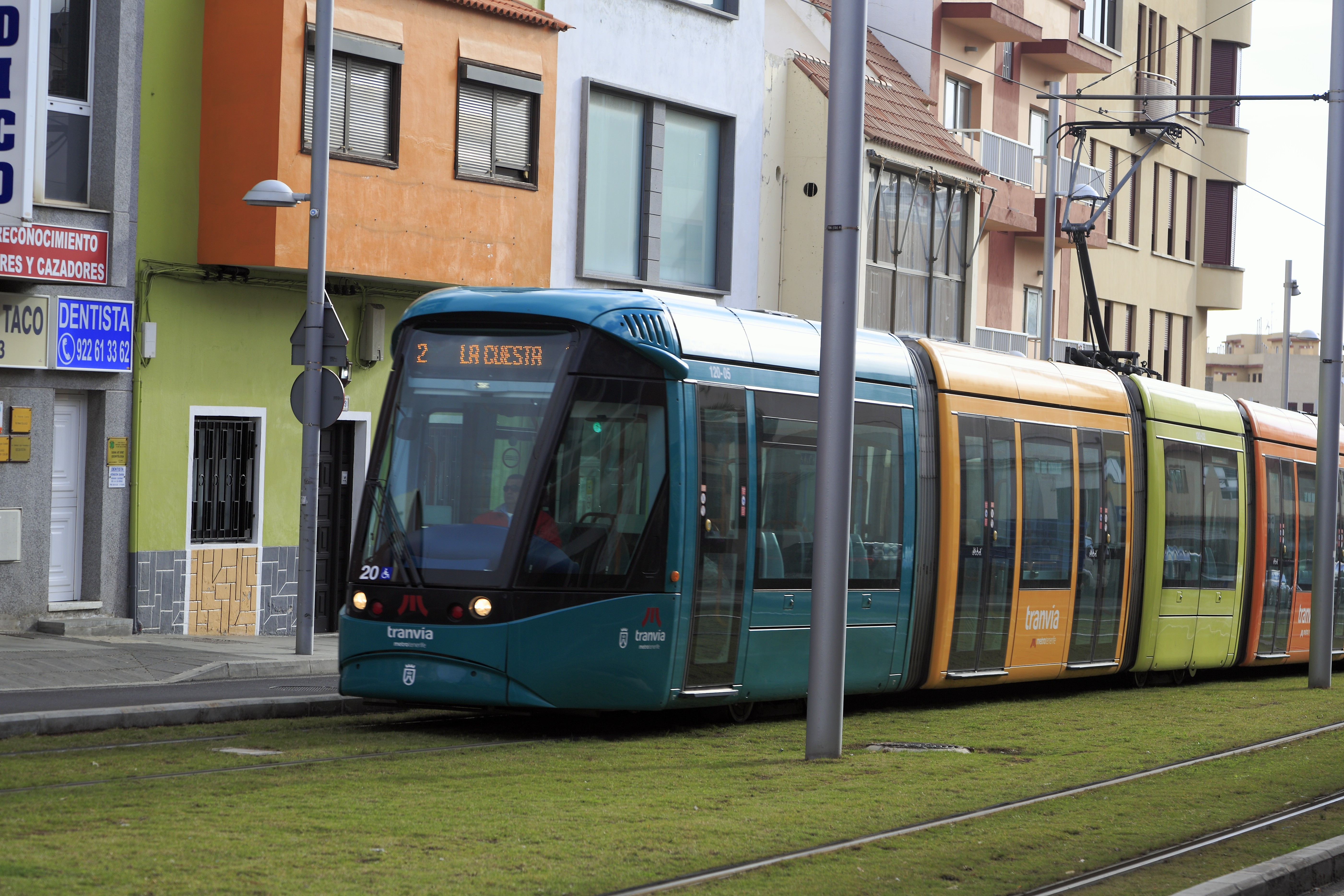 Zug der Linie 2 von Tíncer nach La Cuesta in der Avenida de Taco.